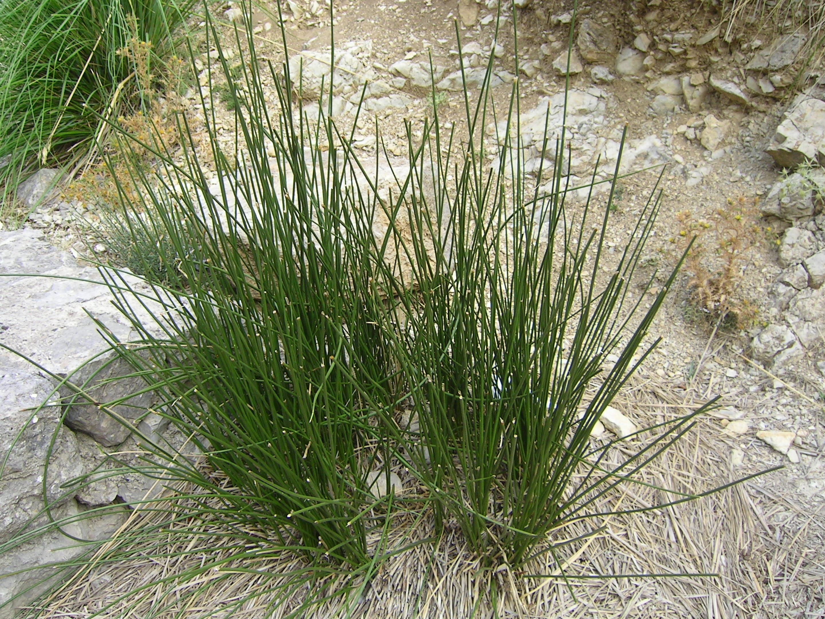 Jonc (Scirpus holoschoenus). Fotografia feta a l'embassament de Cúber, Mallorca.